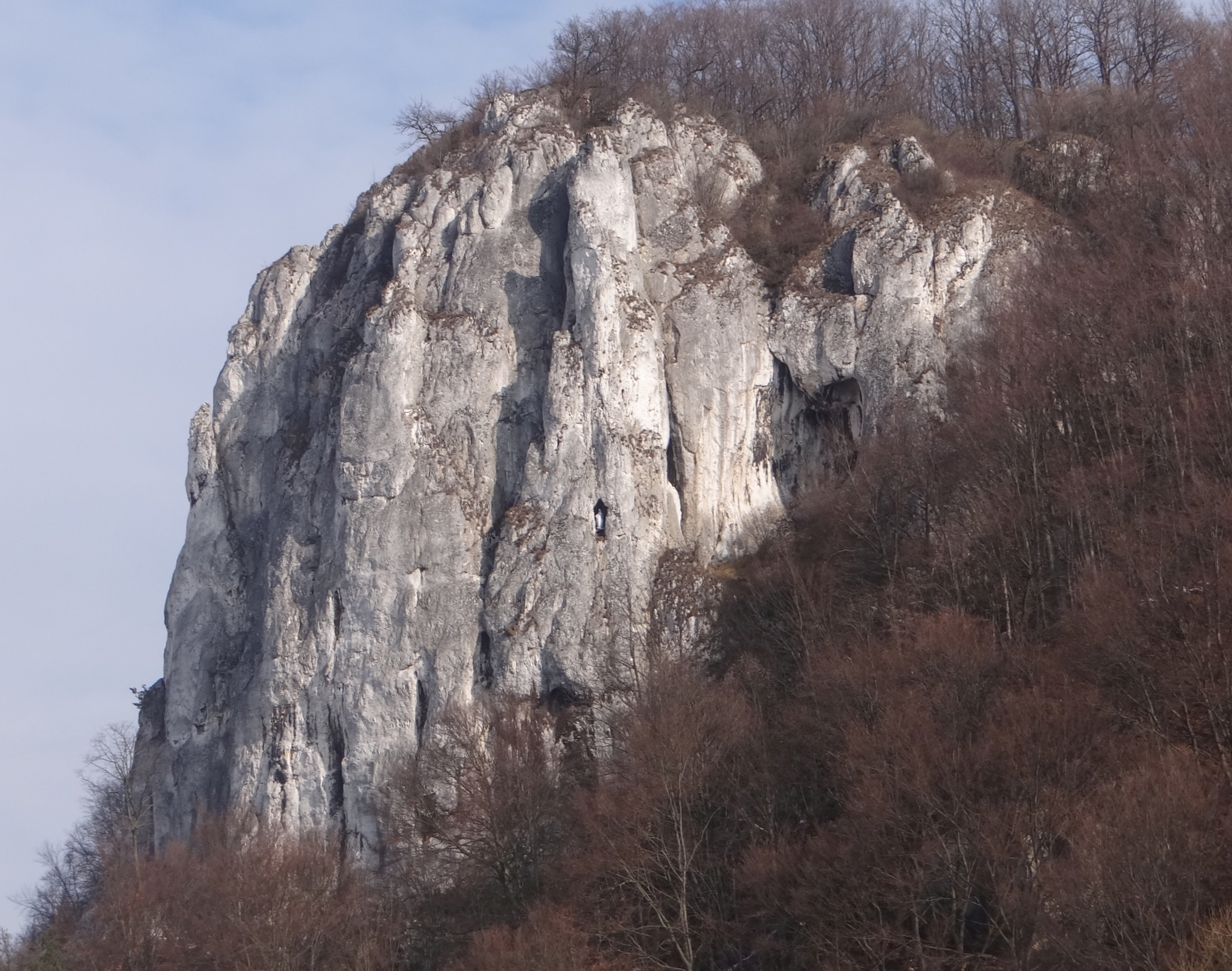 Sokolica w Dolinie Będkowskiej